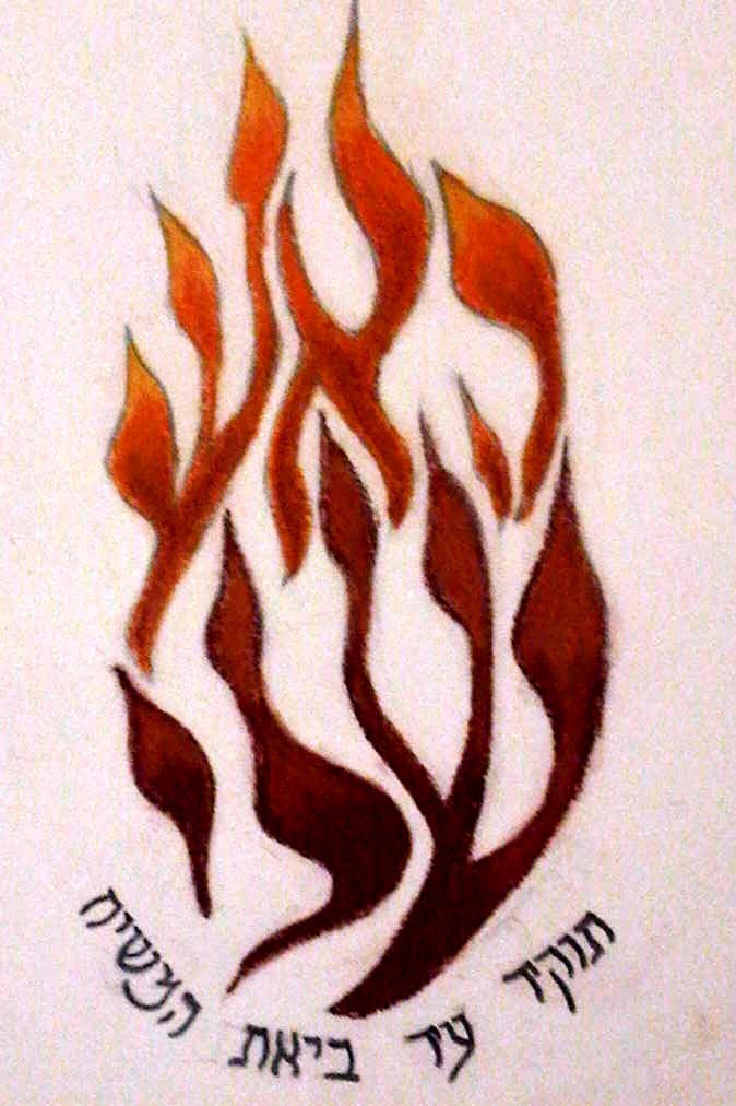 breslev logo